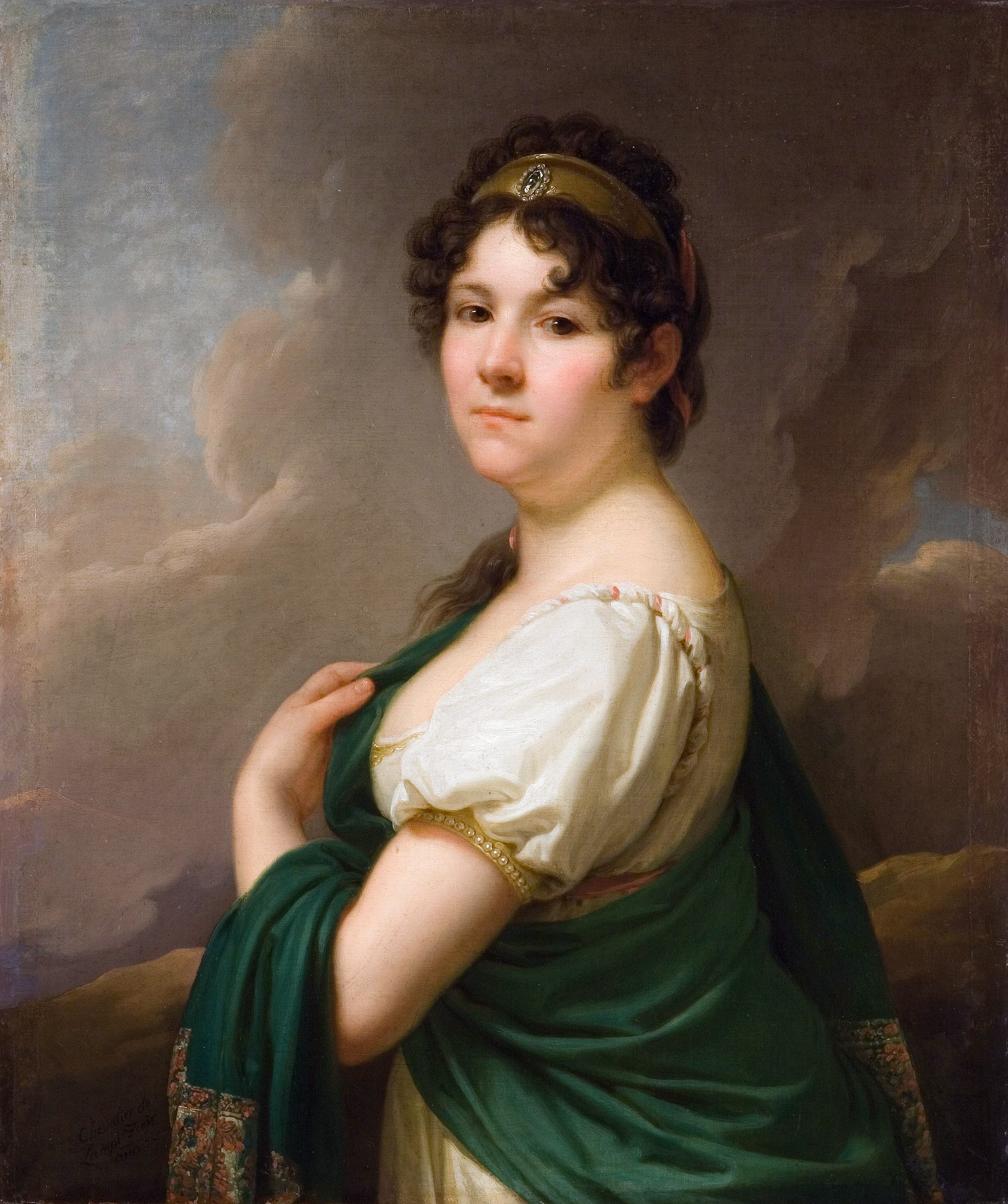 Portrait of Ludwiki z Potockich Kossakowskiejlabel QS:Len,"Portrait of Ludwiki z Potockich Kossakowskiej" label QS:Lpl,"Ludwika z Potockich Kossakowska" label QS:Lbe-tarask,"Партрэт Людвікі Касакоўскай (Ludvika Kasakoŭskaja) з роду Патоцкіх (Patocki)"